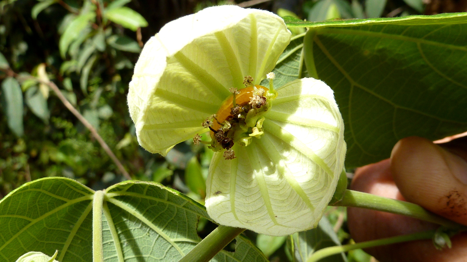 Dalechampia affinis Müll. Arg.